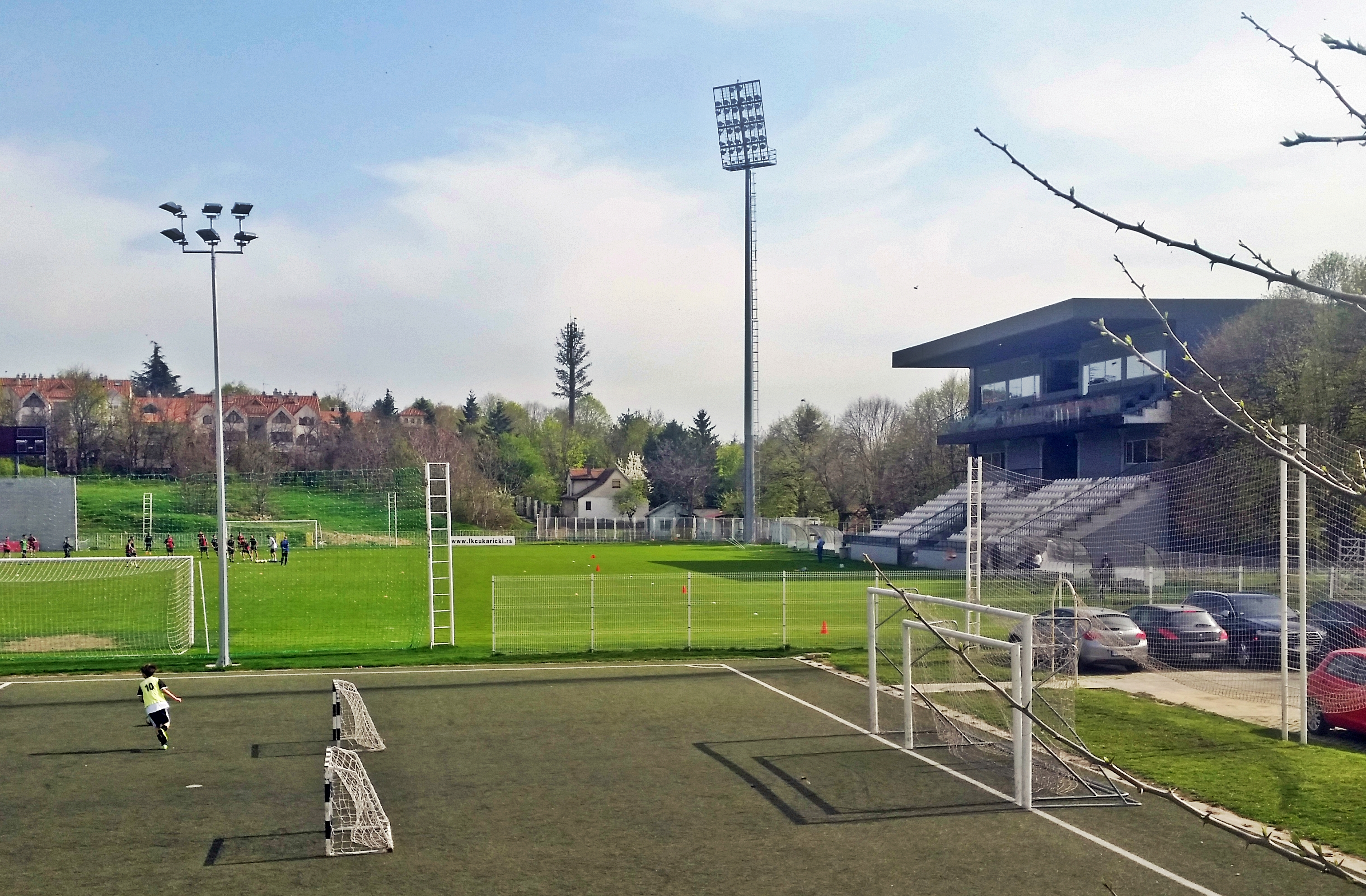 Stadion Cukarickog - Tribina Zapad